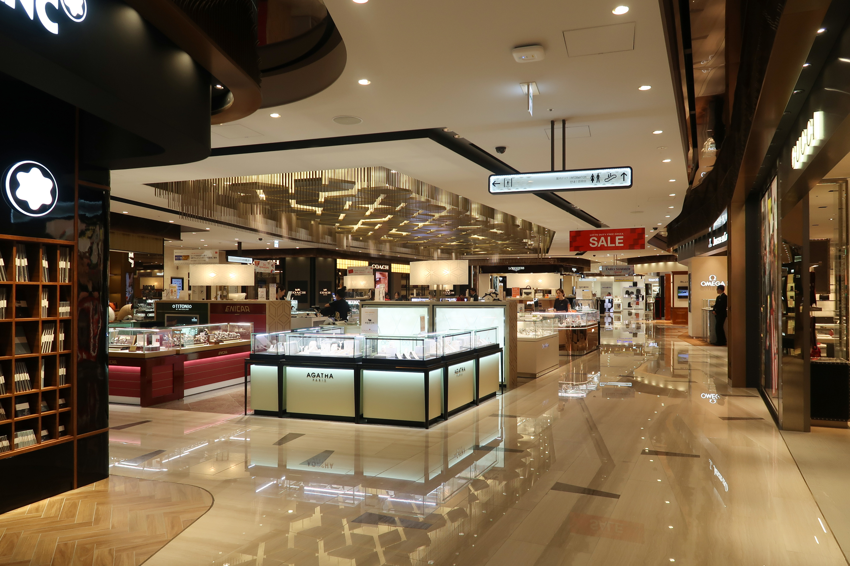 Tokyu Plaza Ginza Level 8